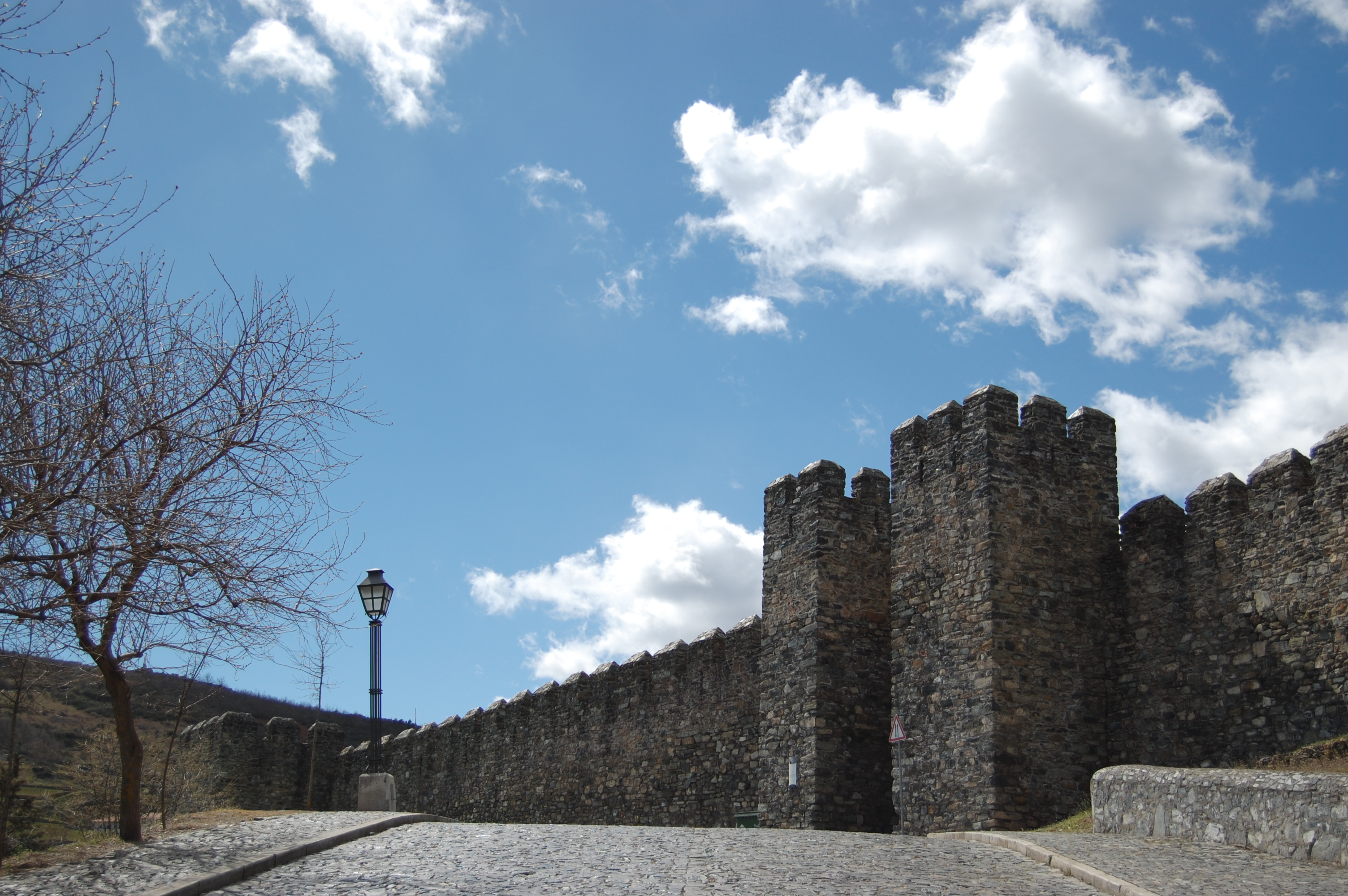 El Castillo de Bragança, al noreste de Portugal.